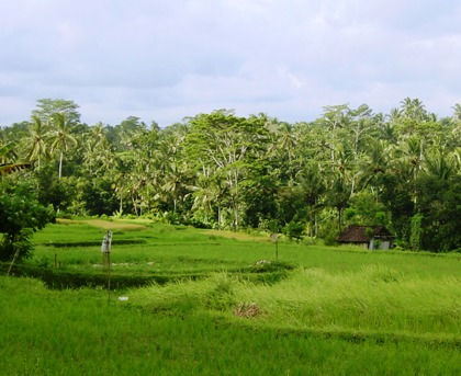 投稿者自身による撮影。 バリ島のライステラス。